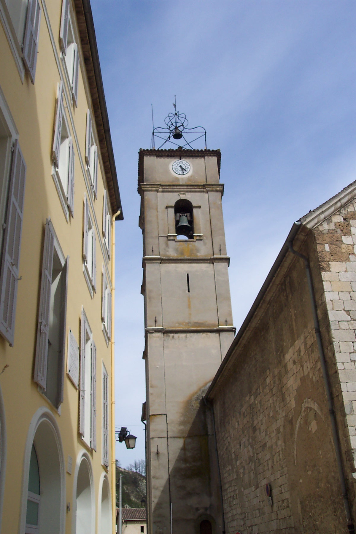 ruelle vers l'église